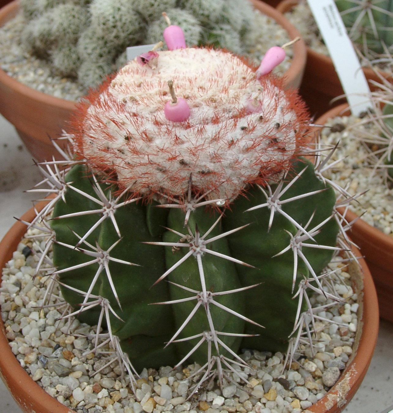 Melocactus violaceus in der Kakteengärtnerei Piltz